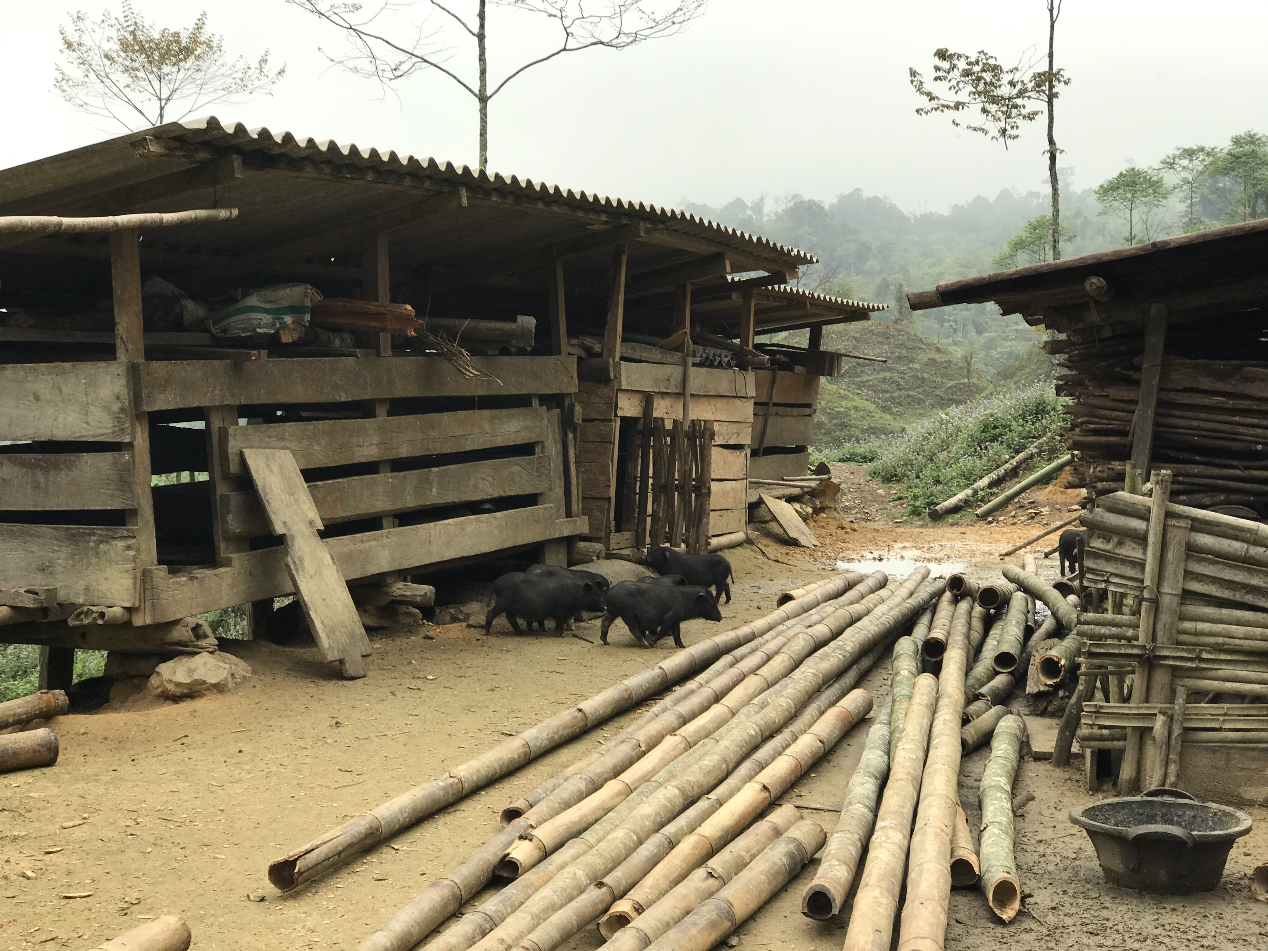 Lợn đen Tả Phìn Hồ